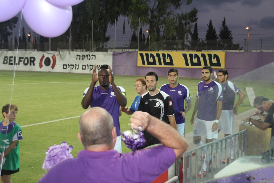 הכח רמת גן פותחת את עונת 2013 עם הקפטן מייקל טקורה